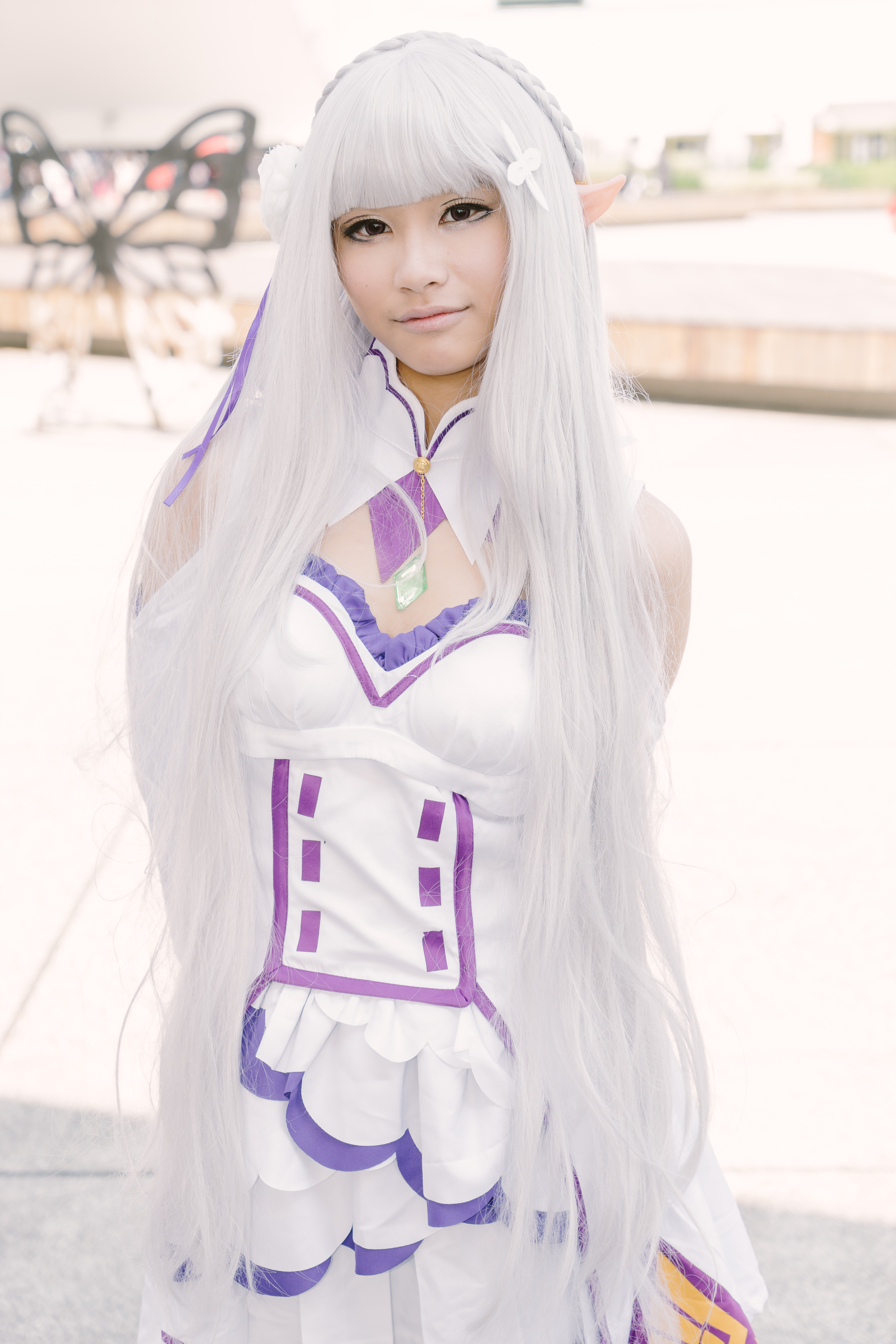 第25屆亞洲動漫創作展，《Re:從零開始的異世界生活》愛蜜莉雅cosplayer。